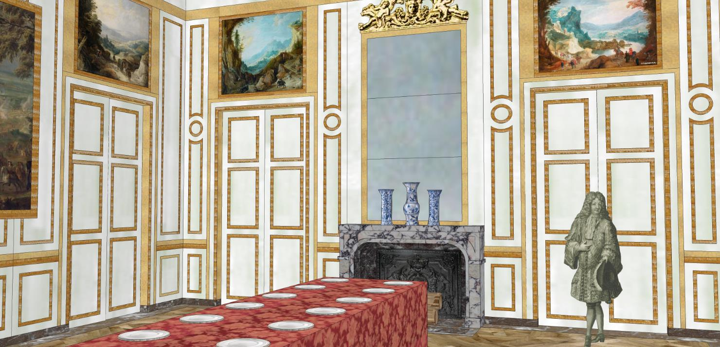 Essai de restitution de la salle à manger de Monseigneur, aile des marronniers du château de Meudon. Table dressée en 1704 pour recevoir le duc de Bavière, beau-frère du Dauphin.